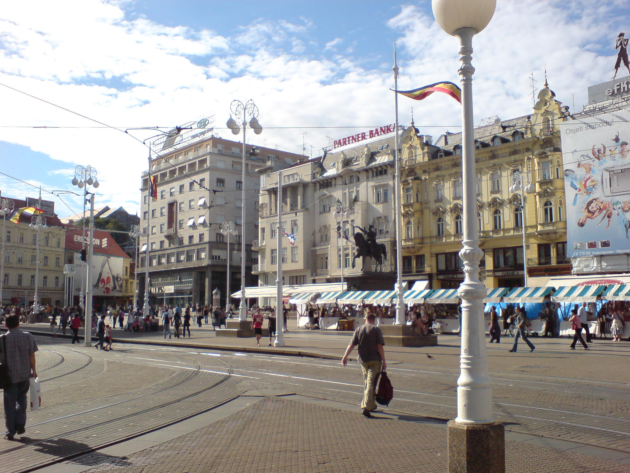 Zagreb